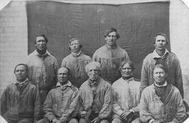 Prisoners in Malmöhus county prison, Sweden, 1861. Fångar i länscellfängelset i Malmö, 1861.